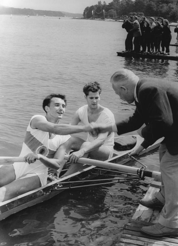 Achim Hill, Eberhard Hirschfelder, Heinz Dose Zentralbild Ulmer Pu-Krz. 29.7.1957 VIII. Rudermeisterschaften der Deutschen Demokratischen Republik in Grünau Auf der Regattastrecke in Grünau wurden am 28.7.1957 die VIII. Rudermeisterschaften der DDR ausgetragen. Gleichzeitig fanden auch Nachwuchsbestenkämpfe statt und die Jugendmeister wurden ermittelt. Zwei Wochen später werden die Sieger auf der gleichen Strecke um den gesamtdeutschen Meistertitel kämpfen. UBz: Der Präsident der Sektion Rudern der Deutschen Demokratischen Republik, Heinz Dose, beglückwünscht die neuen DDR-Meister im Zweier ohne Steuermann Achim Hill und Eberhard Hirschfelder (SC Einheit Berlin). Sie siegten vor BSG Motor Magdeburg und dem 1. Boot des SC Einheit Berlin.